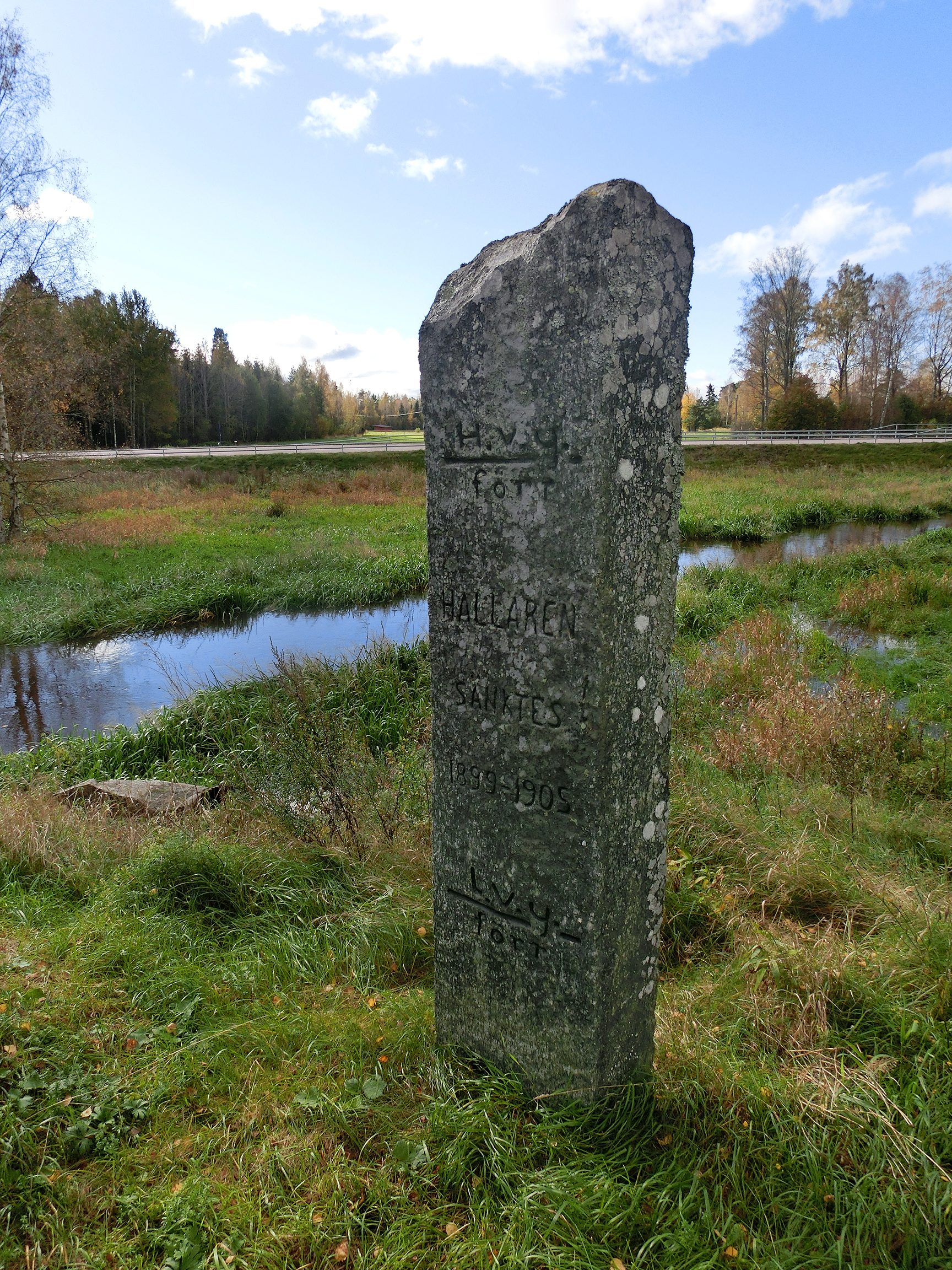 Minnessten (RAÄ-nr Möklinta 18:1) invid Kilsån vid Sundsbacka, Möklinta socken, Övertjurbo härad, Sala kommun, Västmanlands län, Västmanland, Sverige. Stenen har texten "HALLAREN SÄNKTES 1899-1905", samt i överdelen en markering (vattenståndsmärke) för högvattenytan före säkningen och i nederdelen en markering för lågvattenytan före säkningen. I bakgrunden ses länsväg U 835, som går från Sala och norrut till länsgränsen mellan Västmanlands län och Dalarnas län.